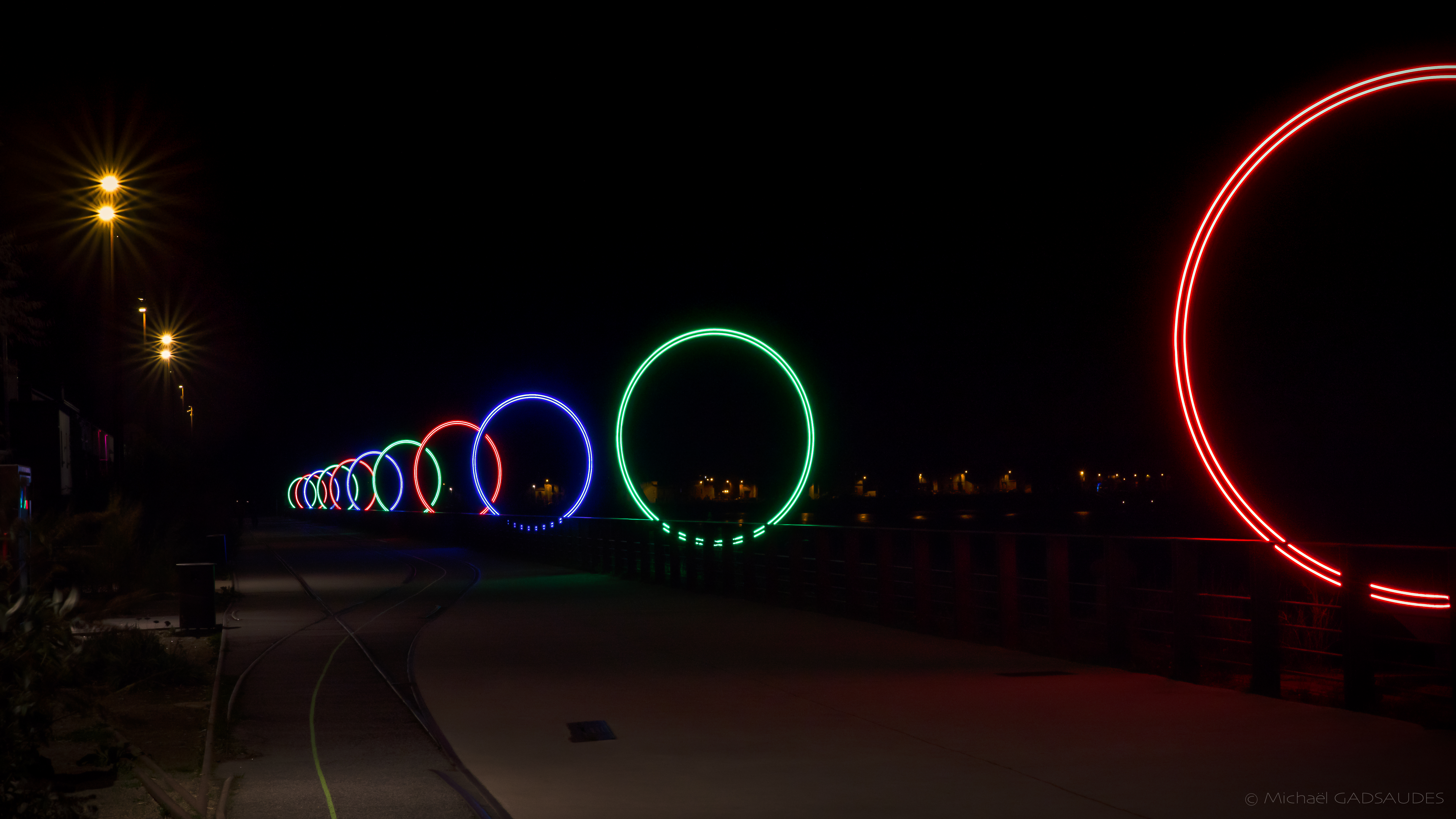 Les anneaux Buren, quai des Antilles - © Michaël GADSAUDES